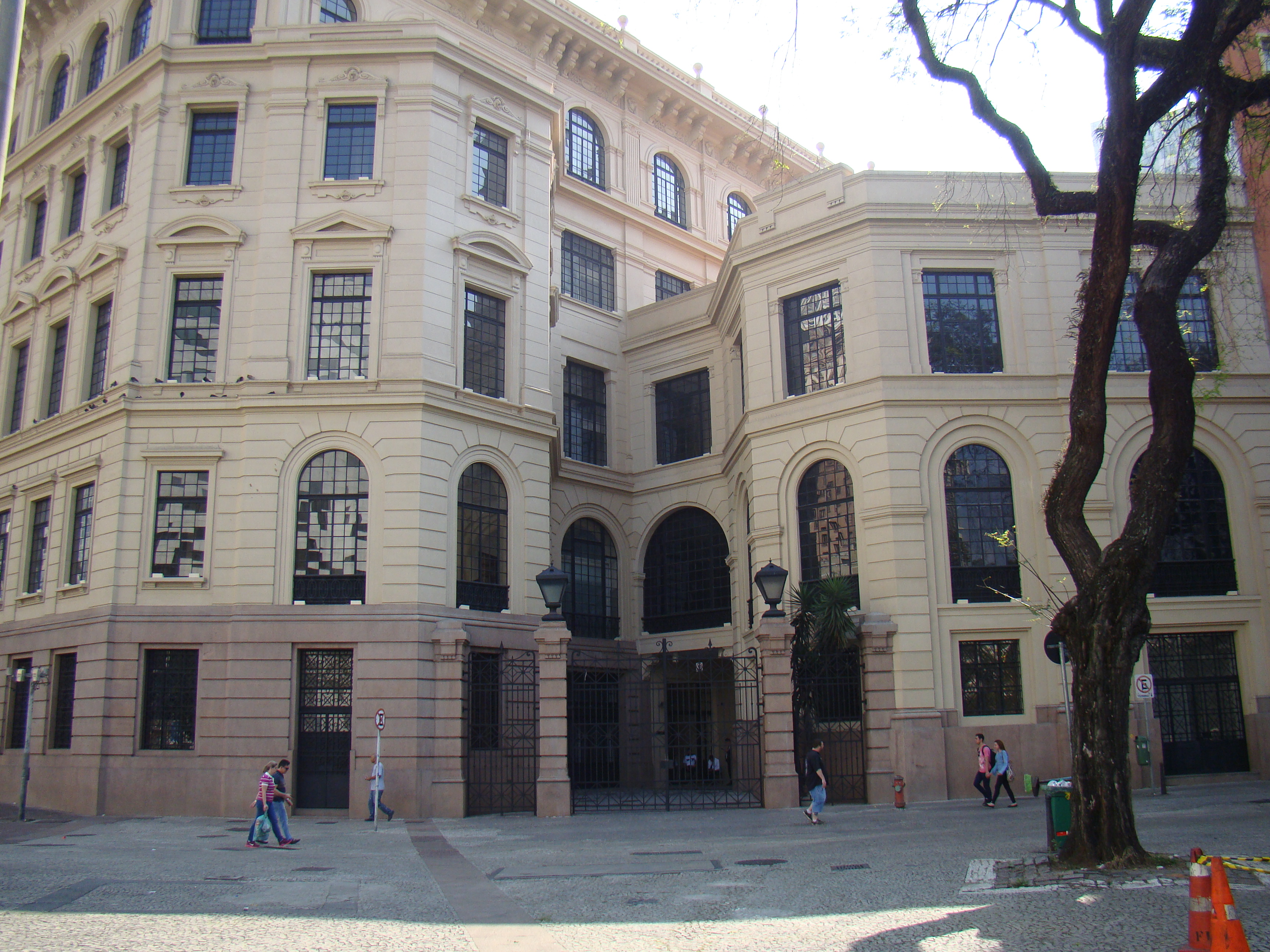 Lateral direita do Palácio dos Correios, em São Paulo (SP), Brasil.